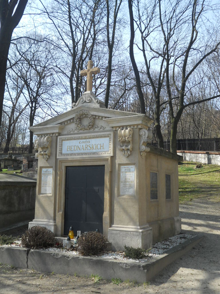 Grobowiec rodziny Bednarskich na Starym Cmentarzu Podgórskim w Krakowie.